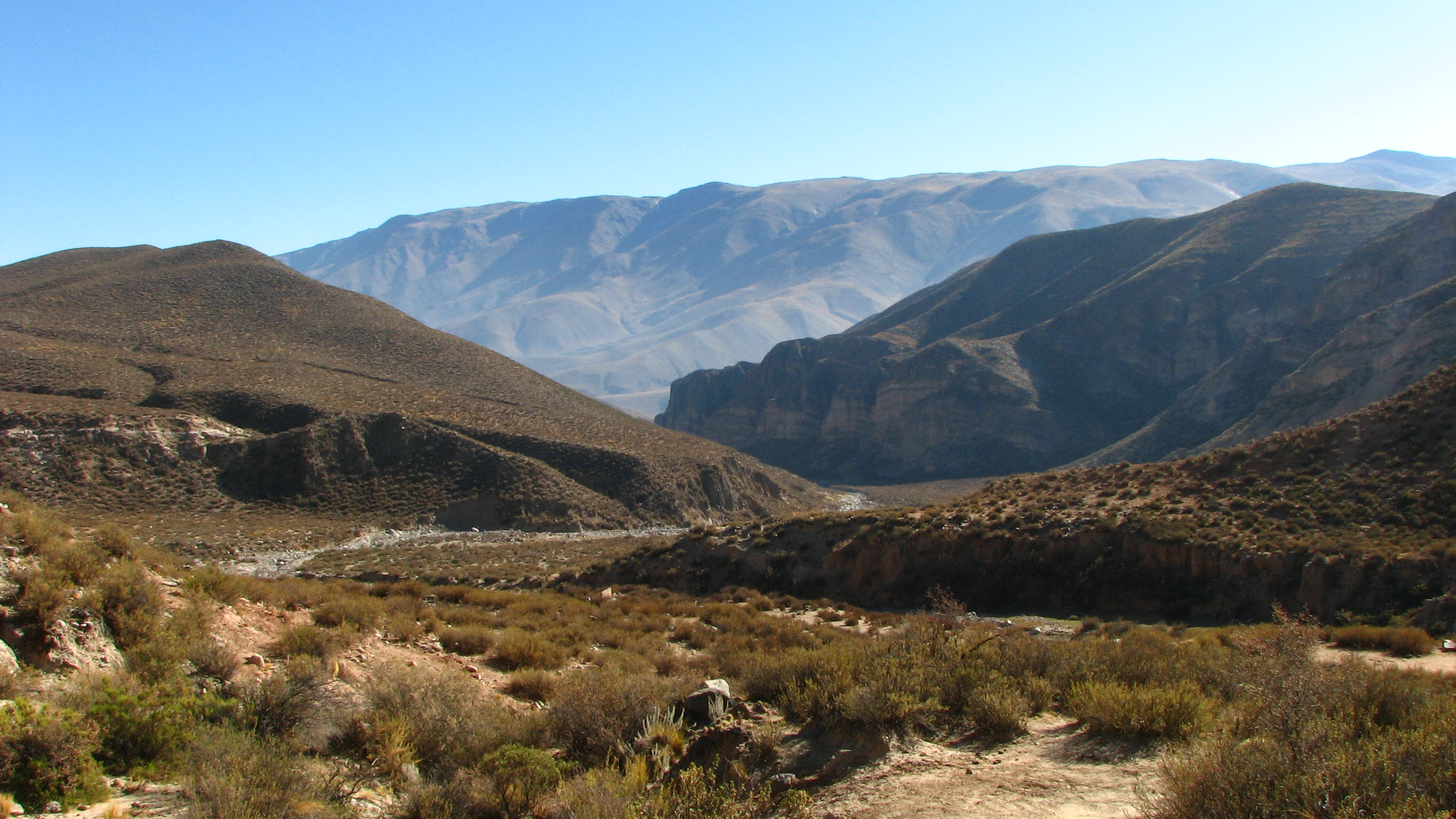 Vista panorámica de la quebrada